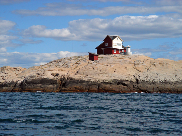 Svangens fyr, Tanums kommun, Bohuslän, Sweden